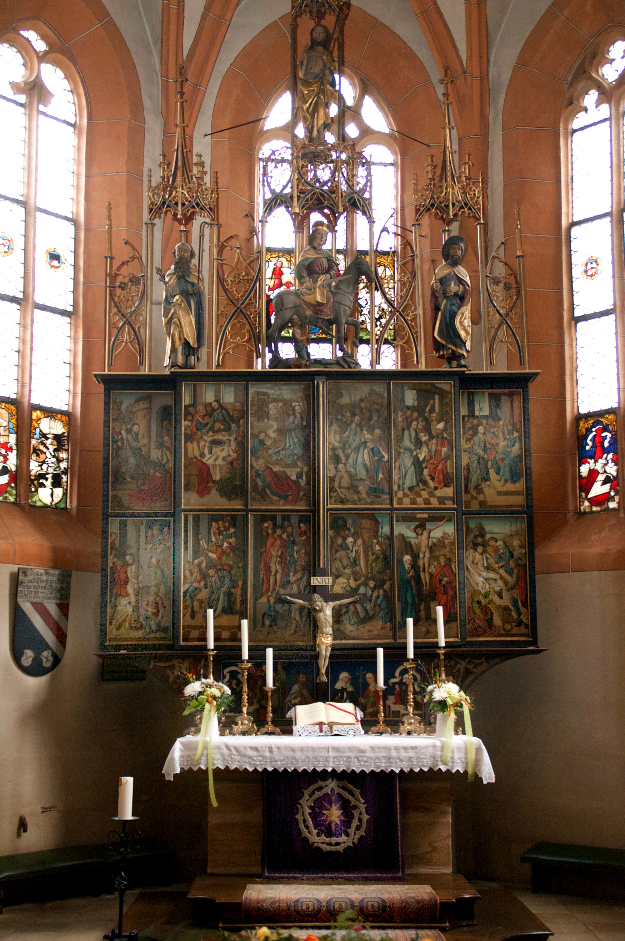 Der Hauptaltar der Kirche in Kalchreuth